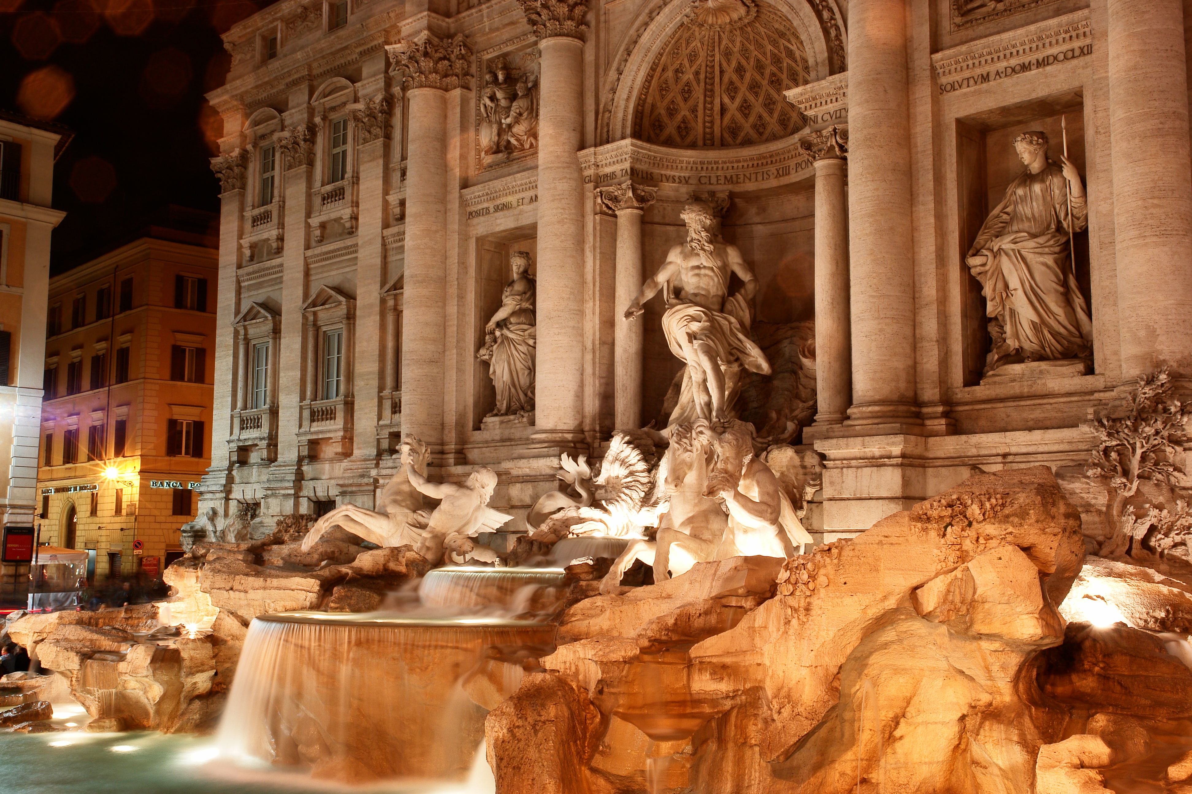 fotografia de la Fontana di Trevi por la noche